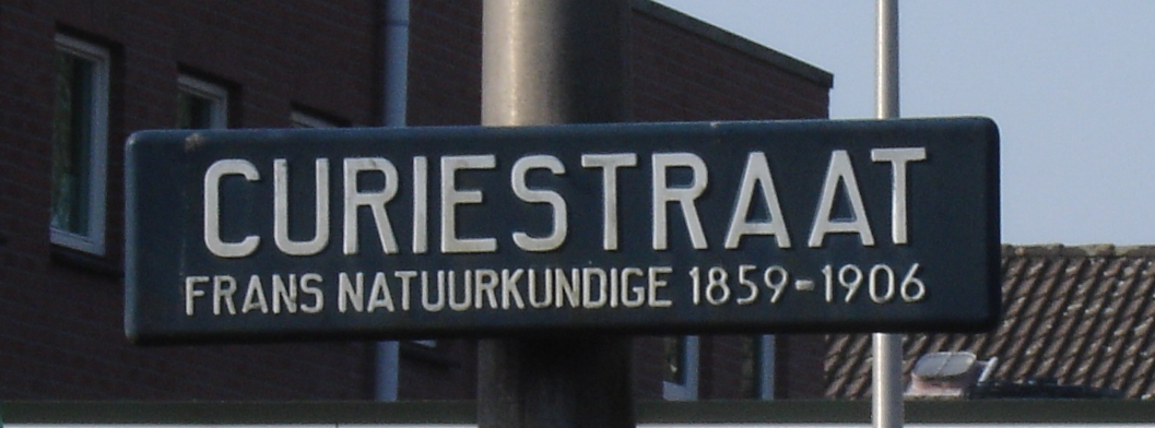 Straatnaam in Hengelo